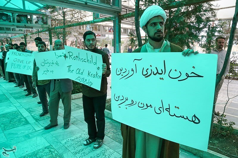 تجمع طلاب در اعتراض به سفر وزیر امور خارجه فرانسه به ایران